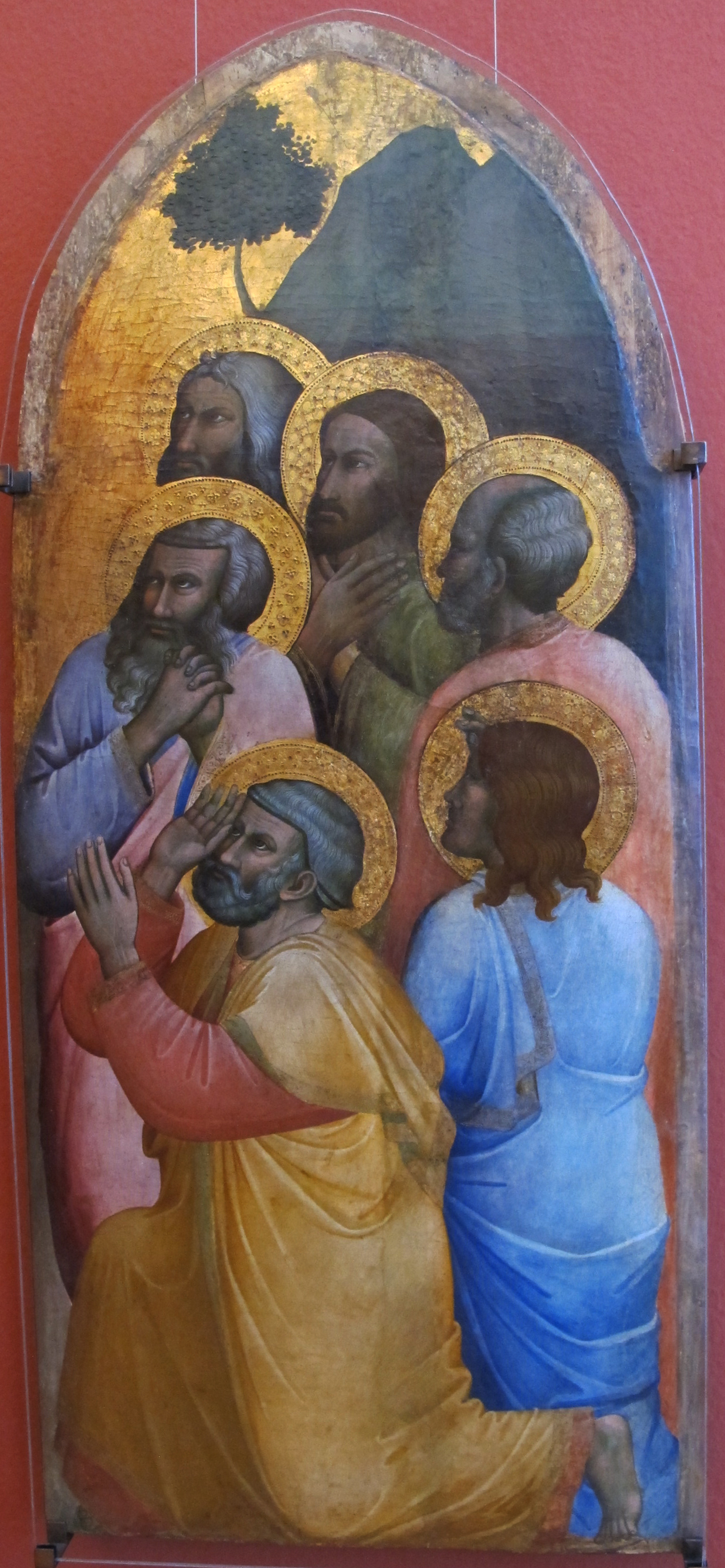 Antonio veneziano, sei apostoli, anni 1480